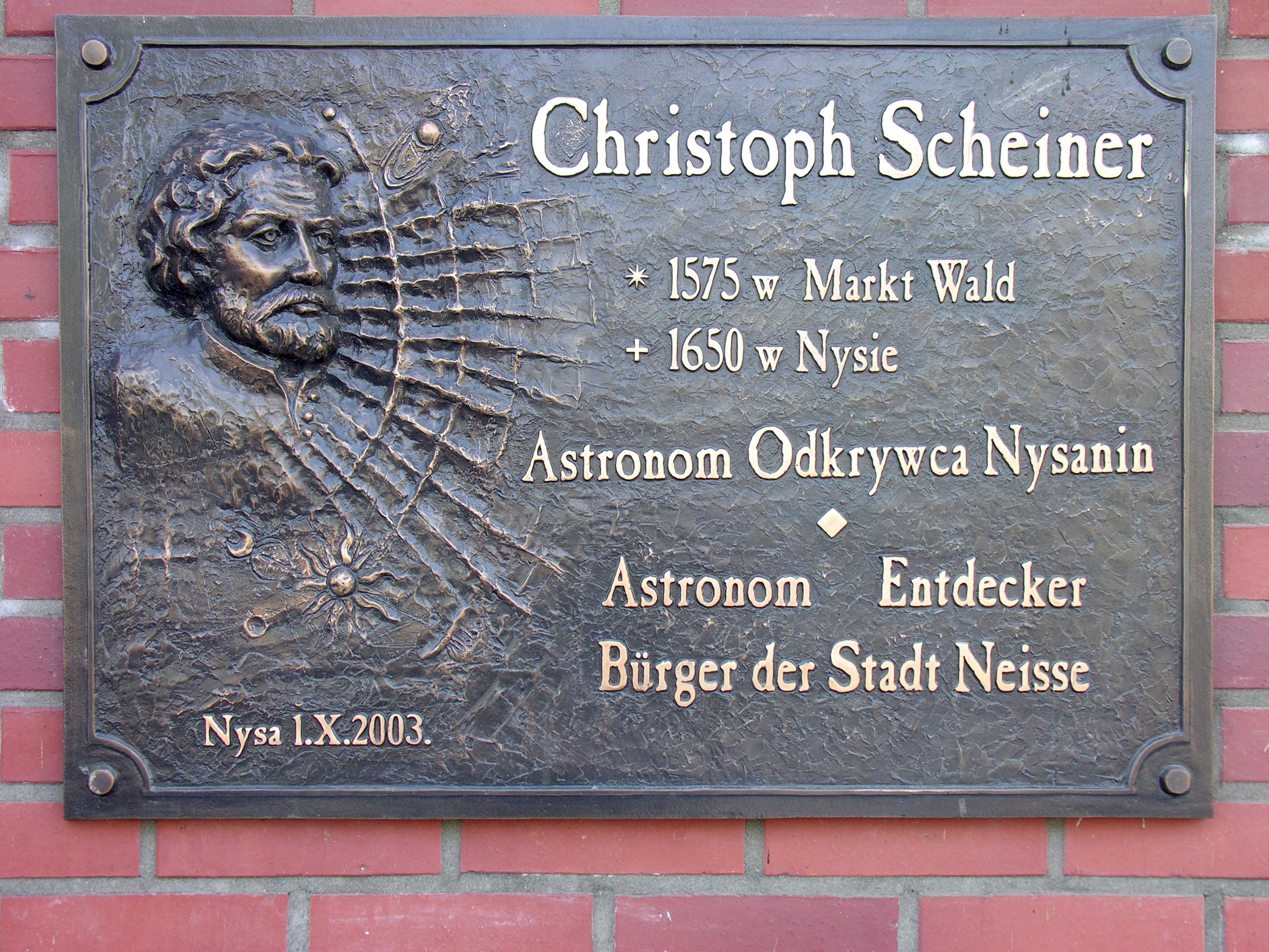 Gedenktafel für Christoph Scheiner in Neisse, Chodowiecki-Straße Nr. 4